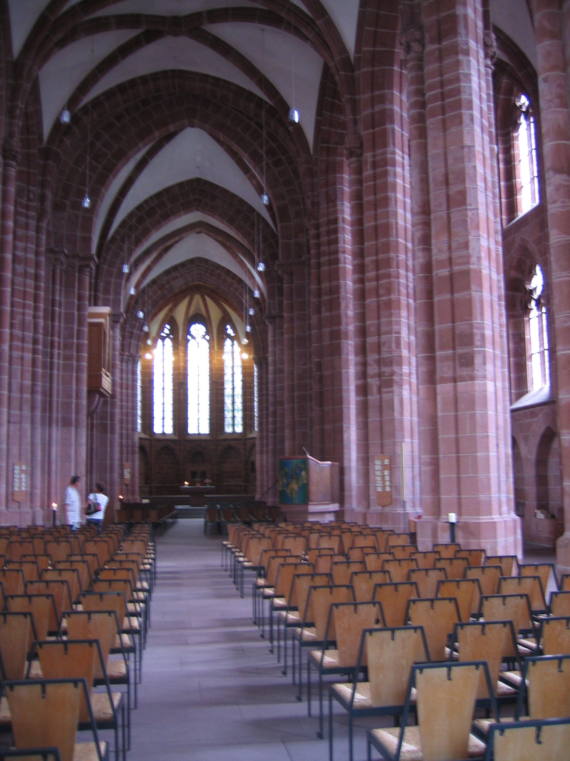 Stiftskirche in Kaiserslautern. Blickrichtung: Ostnordost (ONO)